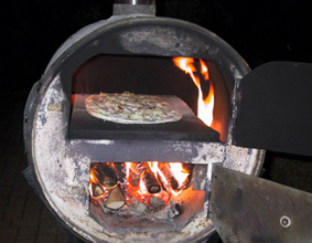 Ma creation de four photographier par mes soins